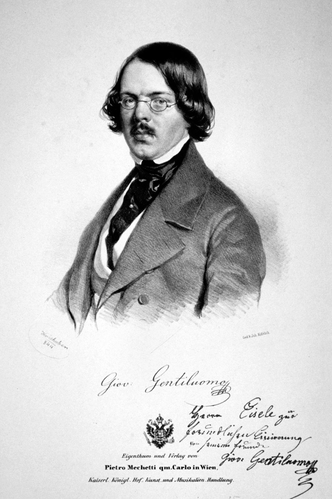 Giovanni Gentiluomo (1809-1886) Sänger und Gesangslehrer.